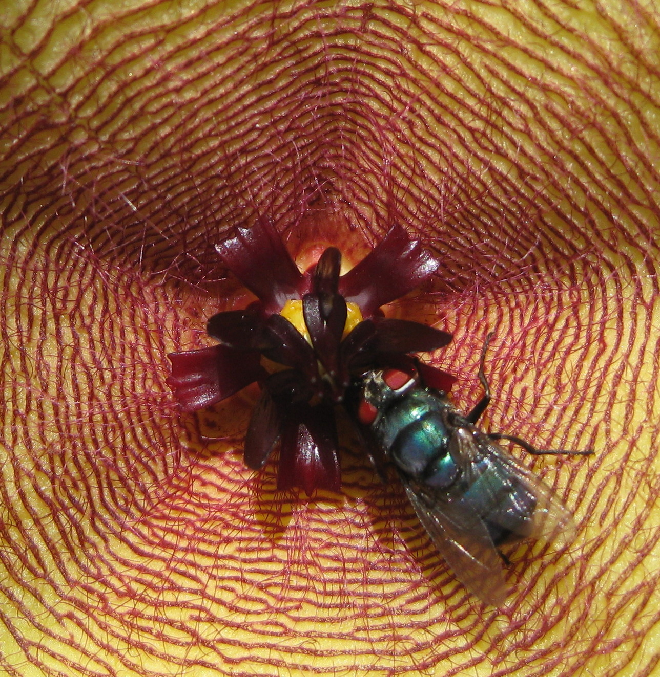 Stapelia gigantea - fly pollination